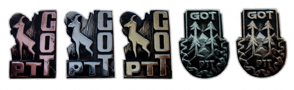 Wzory odznak GOT PTT (pochodzące ze strony Oddz. PTT w Bielsku-Białej)